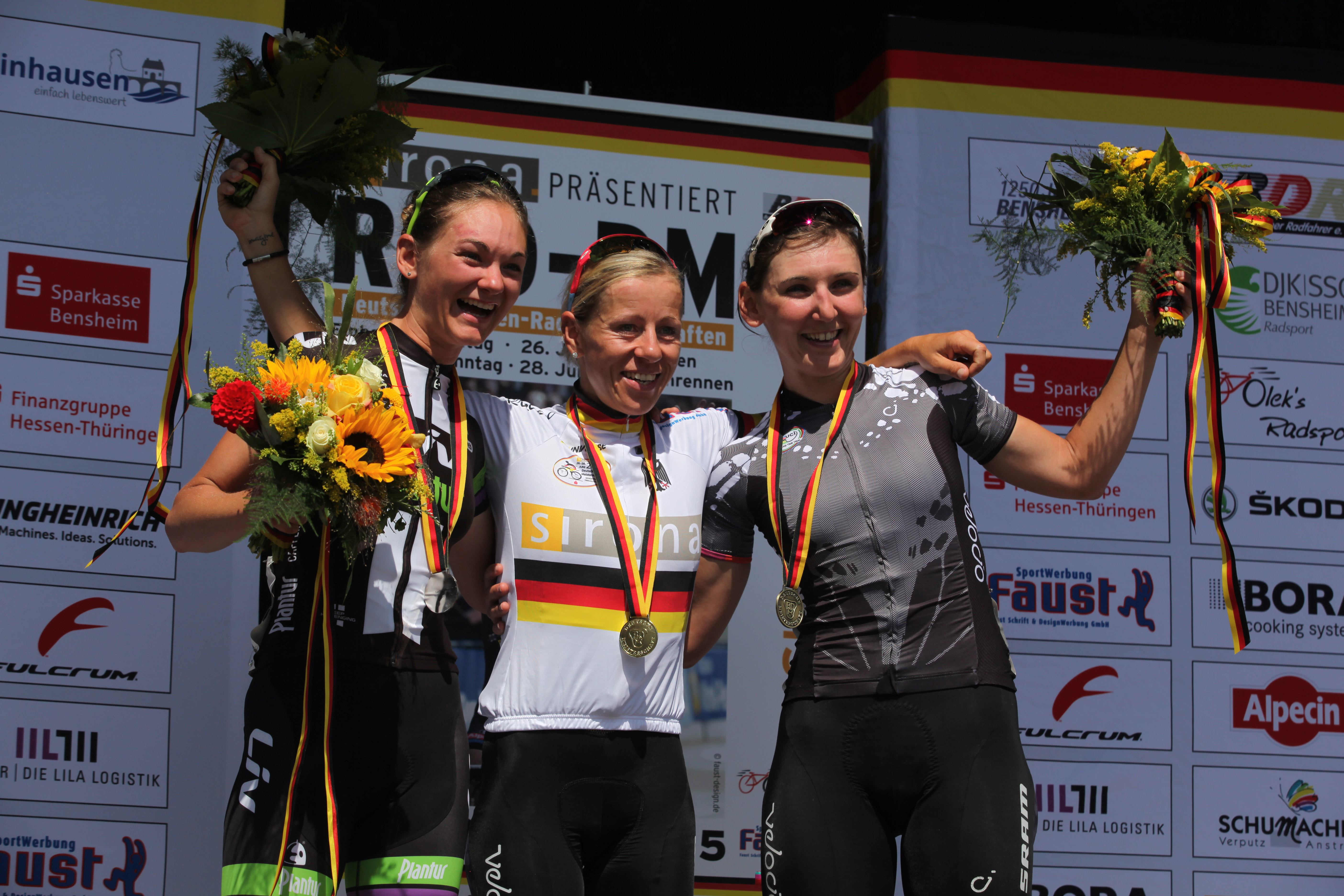 Siegerehrung. Foto von den Deutschen Meisterschaften im Straßenrennen der Frauen (Elite) am 28. Juni 2015 in Bensheim (Hessen), v.l.n.r.: Claudia Lichtenberg, Trixi Worrack, Lisa Brennauer